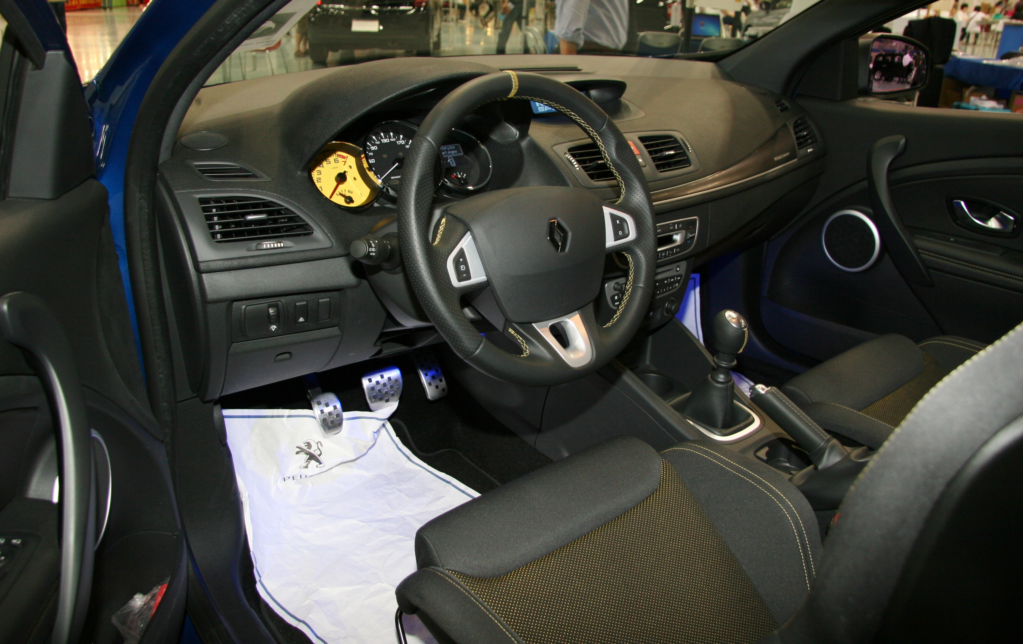 Renault Mégane